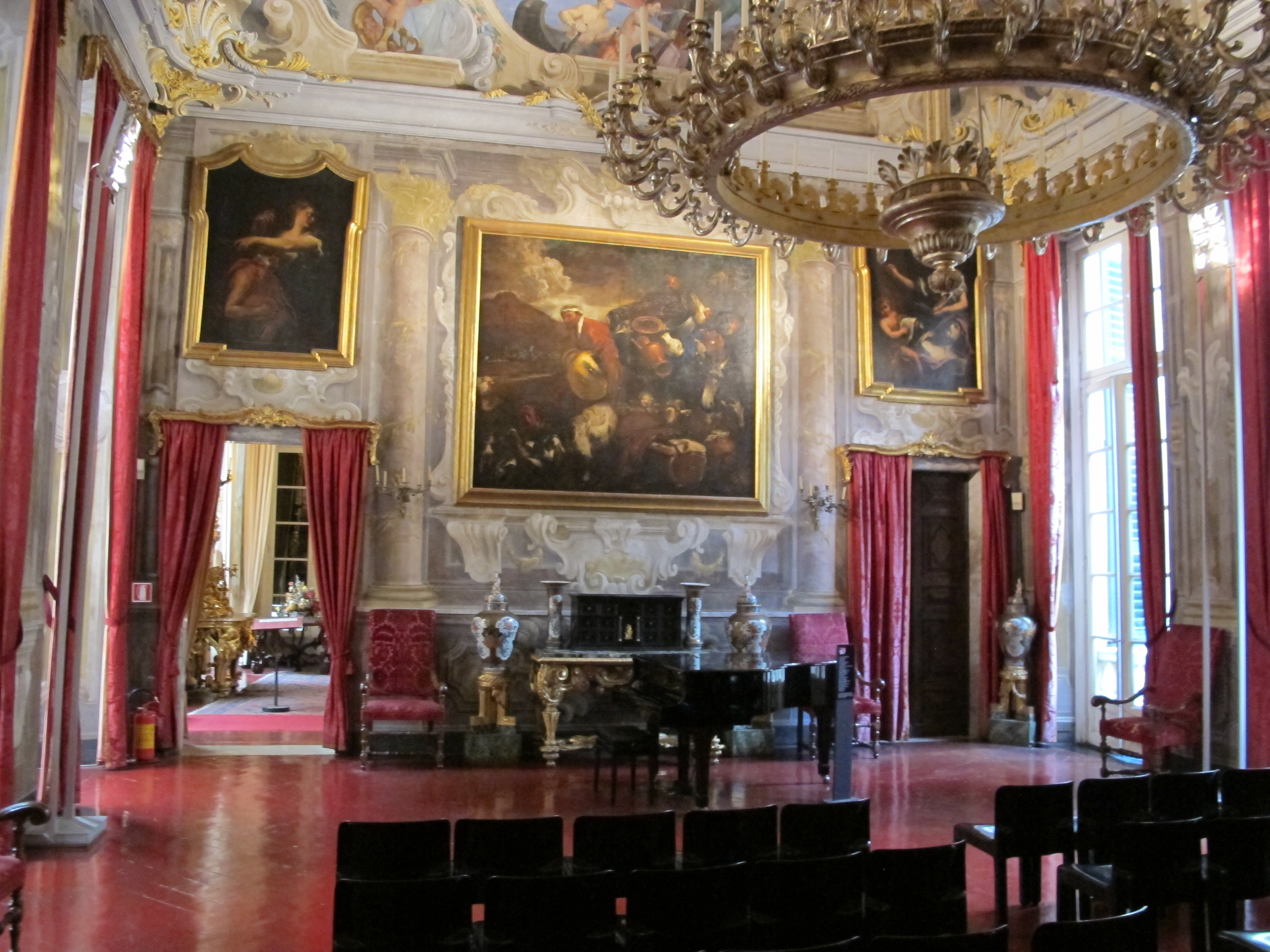 Palazzo Spinola in Pellicceria (Genova)